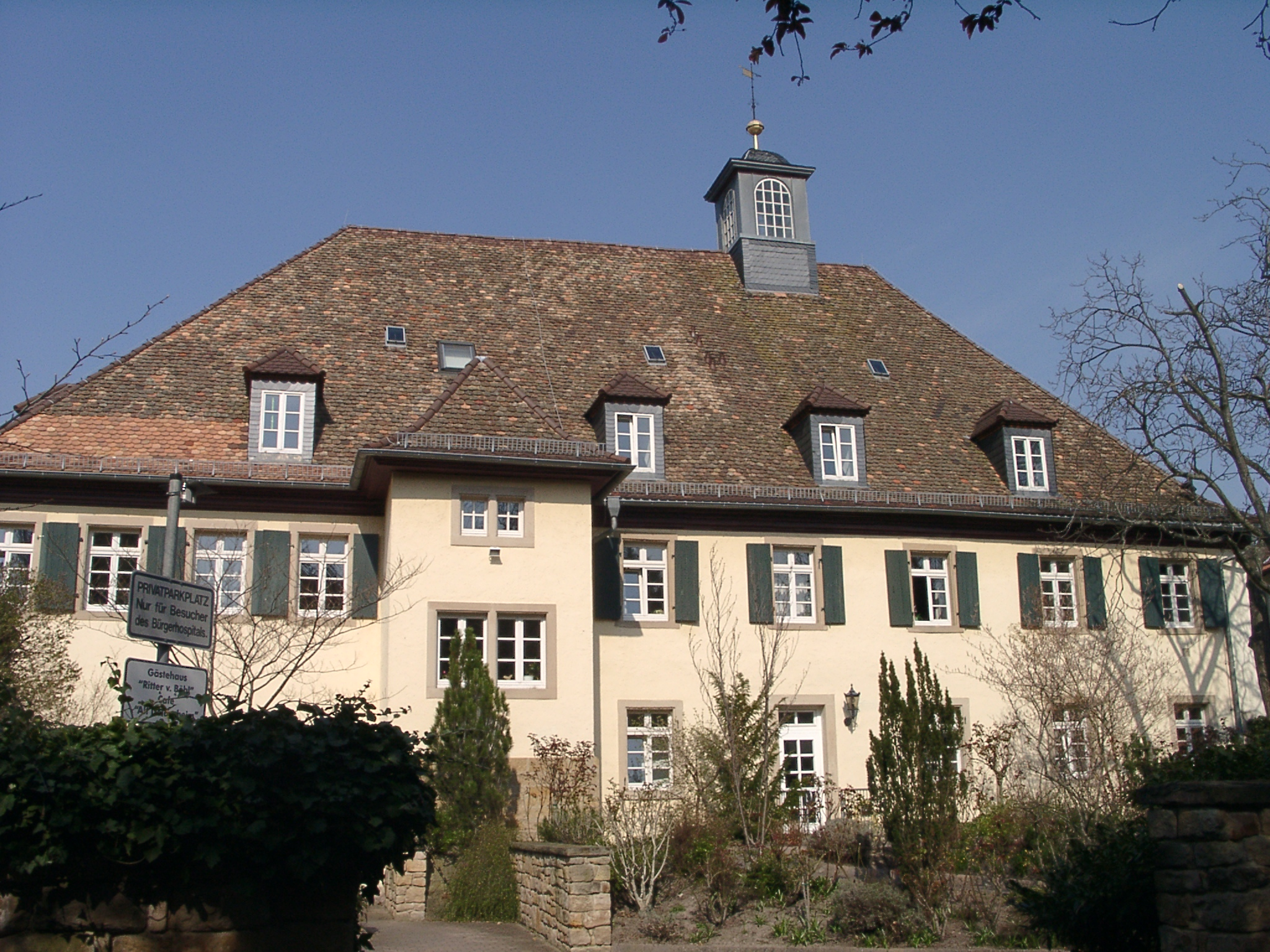 Das Deidesheimer Spital von der Wassergasse gesehen